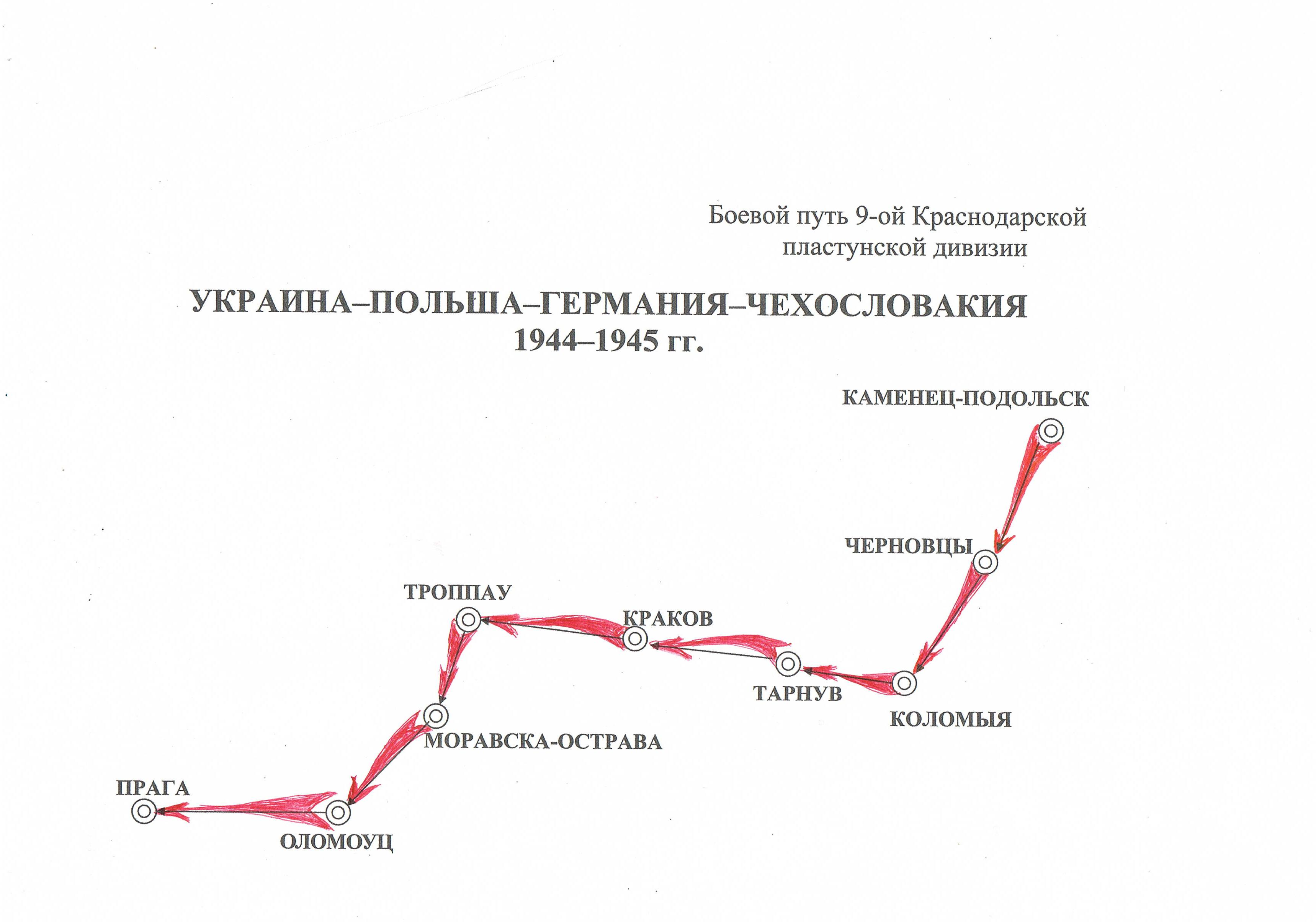 Боевой путь 9 -й Краснодарской Краснознамённой орденов Кутузова и КраснойЗвезды пластунской стрелковой дивизии.1944-1945 гг. (Схема).